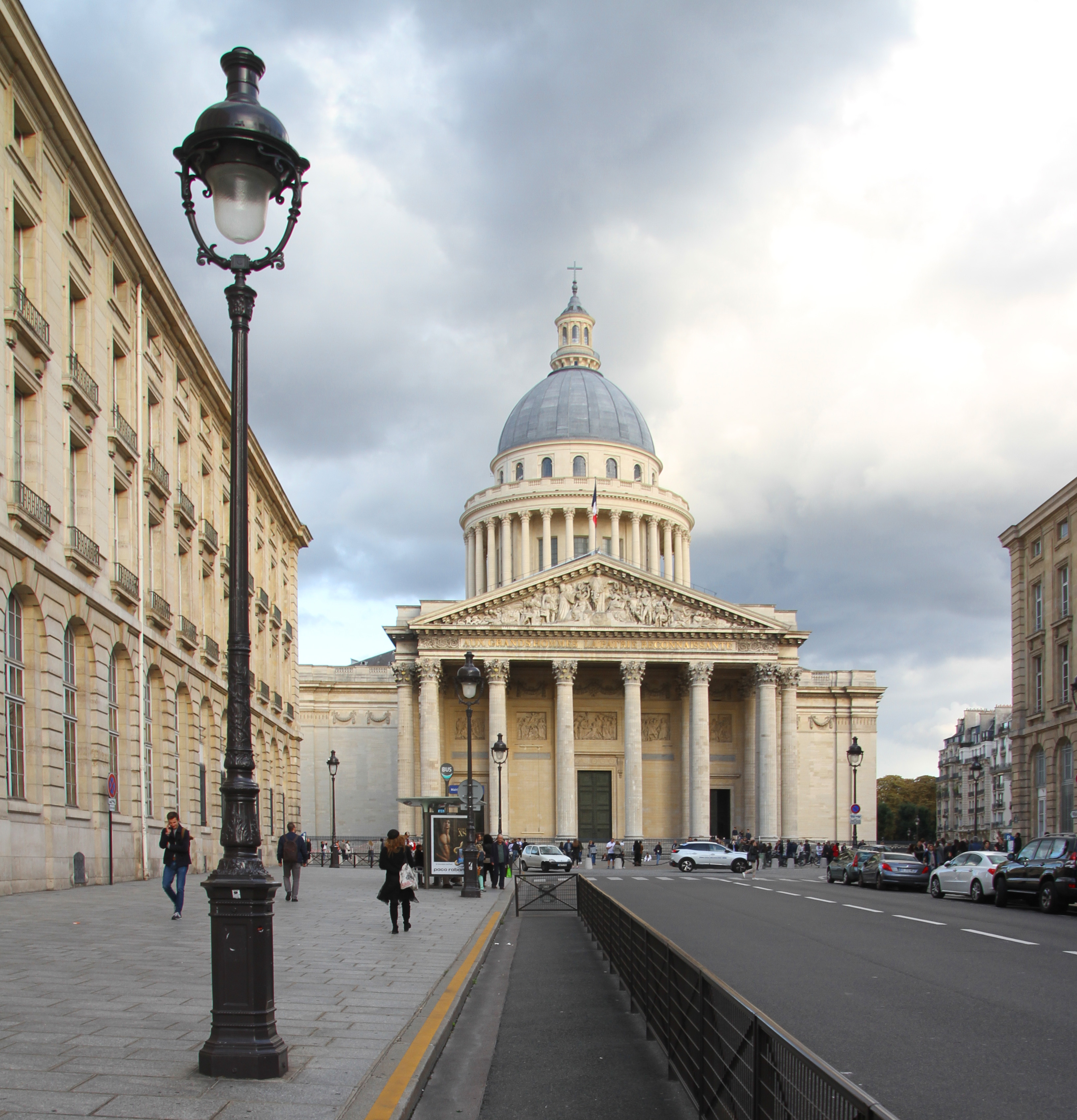 Panthéon in Paris